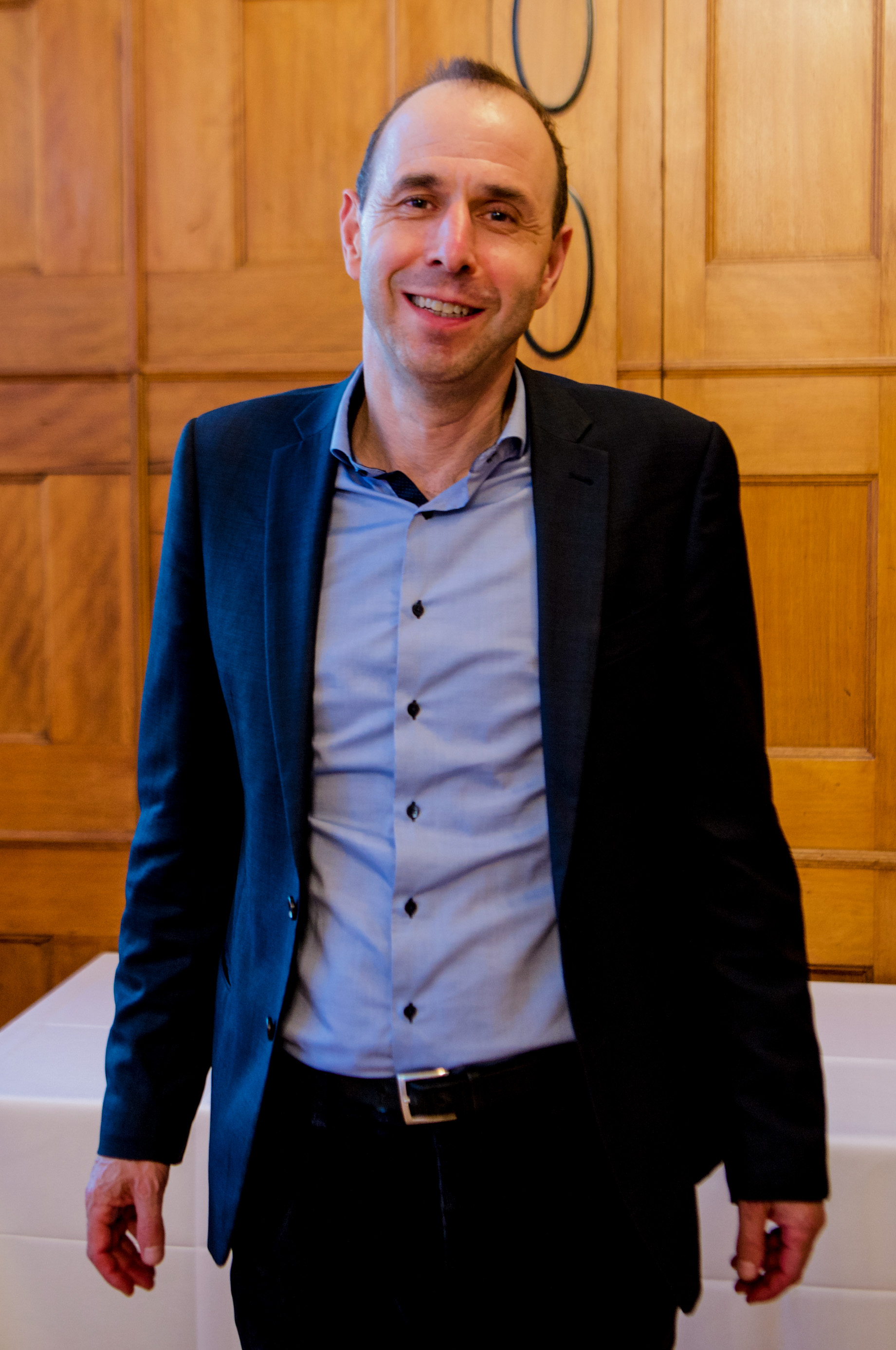 Tobias Straumann, Schweizer Wirtschaftshistoriker, anlässlich einer Buchpräsentation "1931 - Die Finanzkrise und Hitlers Aufstieg" der Stiftung Doku-Zug am 26. Juni 2020 im Casino Zug